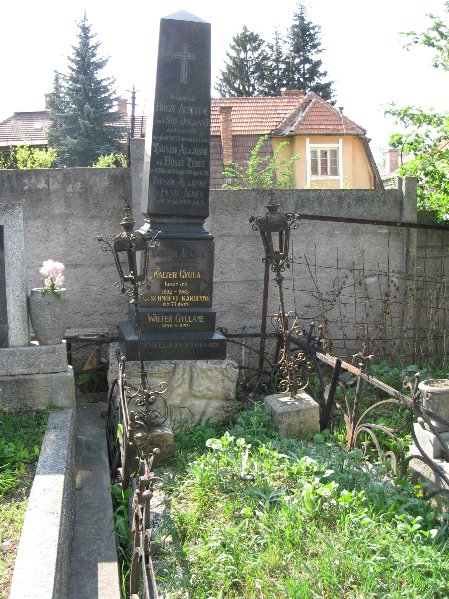 Házsongárdi temető: Walter Gyula sírja